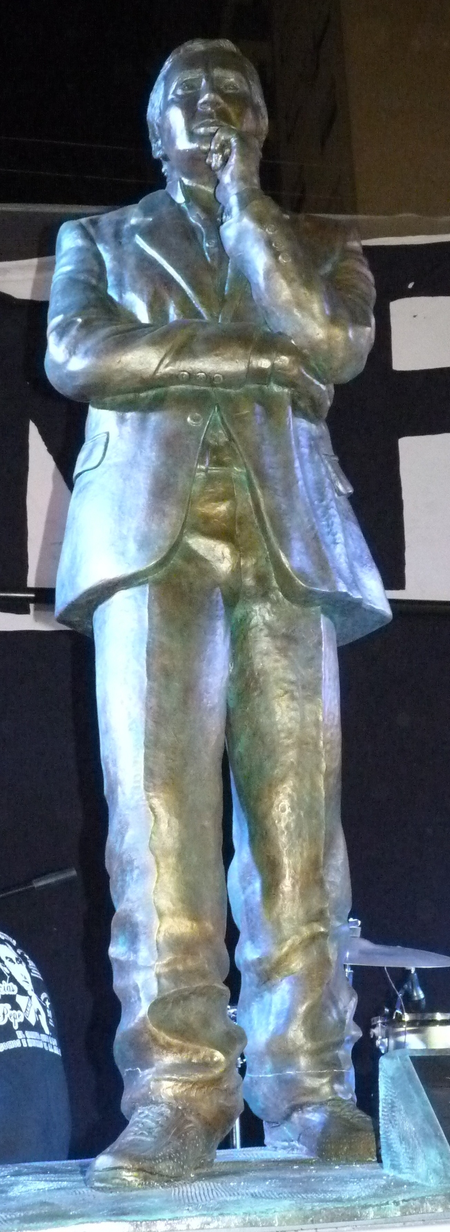 Foto de la estatua de Pepe Romero tomada con mi Panasonic DMC-FZ35